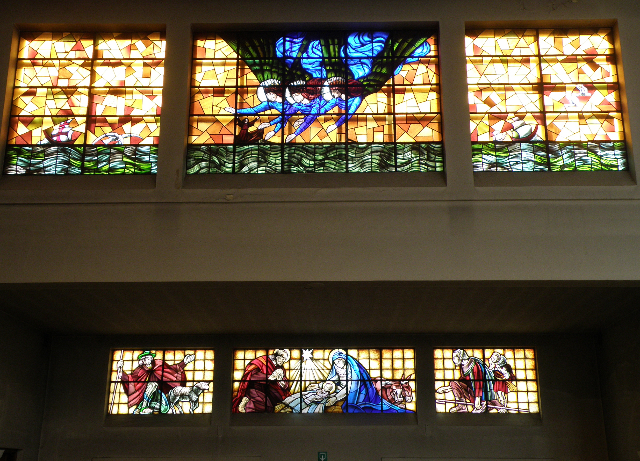 Antwerpen, België. Sint-Walburgiskerk, gelegen aan de Volksstraat nr.41 (ook gevel en ingang aan de Karel Rogierstraat nr.12), anno 1936 in Nieuwe Zakelijkheid gebouwd n.o.v. archit. Flor Van Reeth. Binnenaanzicht. Glasramen van Eugeen Yoors.